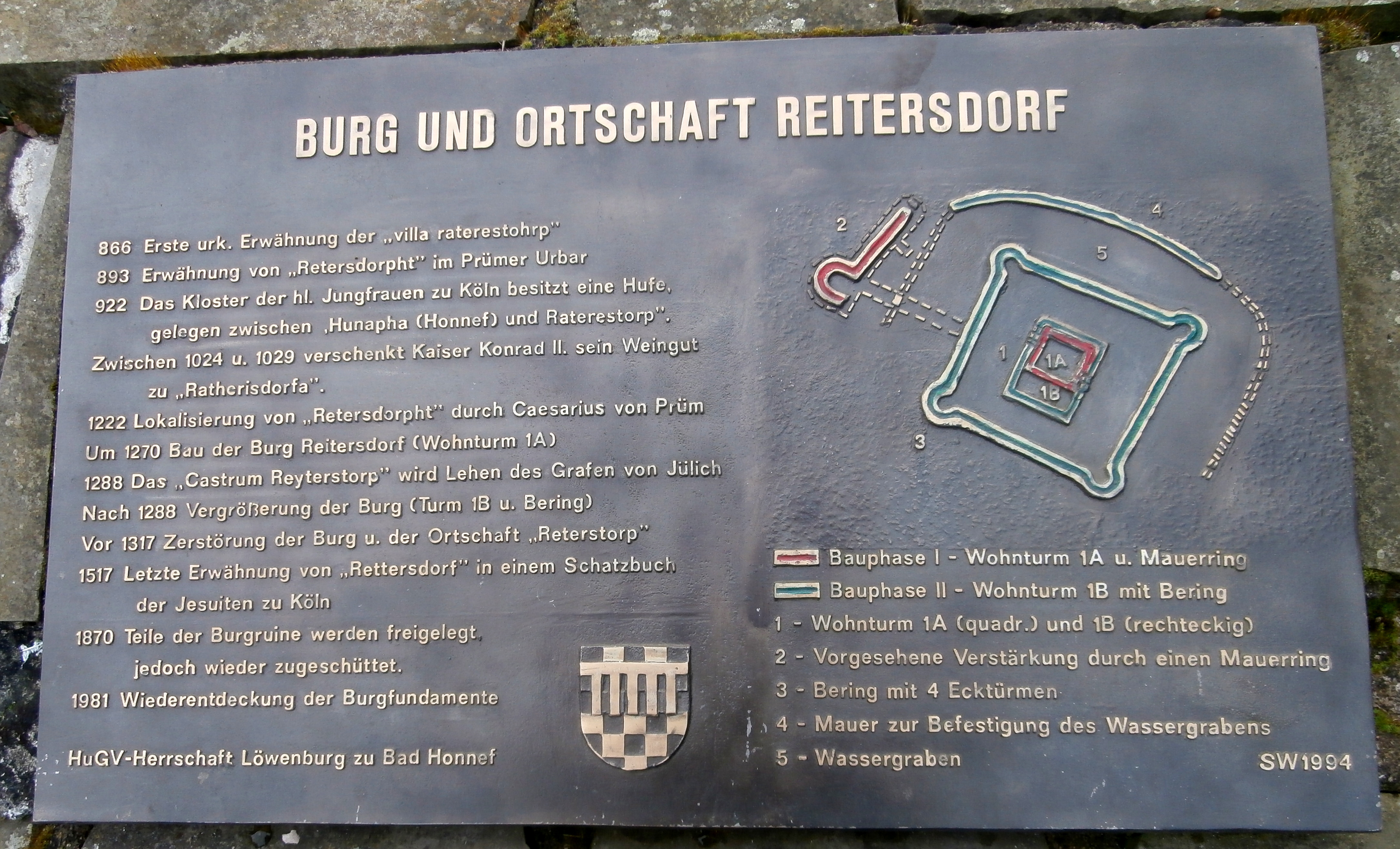 Park Reitersdorf, Bad Honnef: Bronze-Informations-/Gedenktafel des Heimat- und Geschichtsvereins „Herrschaft Löwenburg“ e.V. zur Erinnerung an die Burg und Ortschaft Reitersdorf, erstellt von Sigrid Wenzel 1994